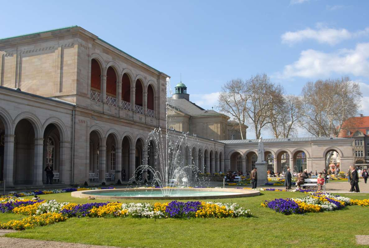 Bad Kissingen, Kurgarten mit Arkaden